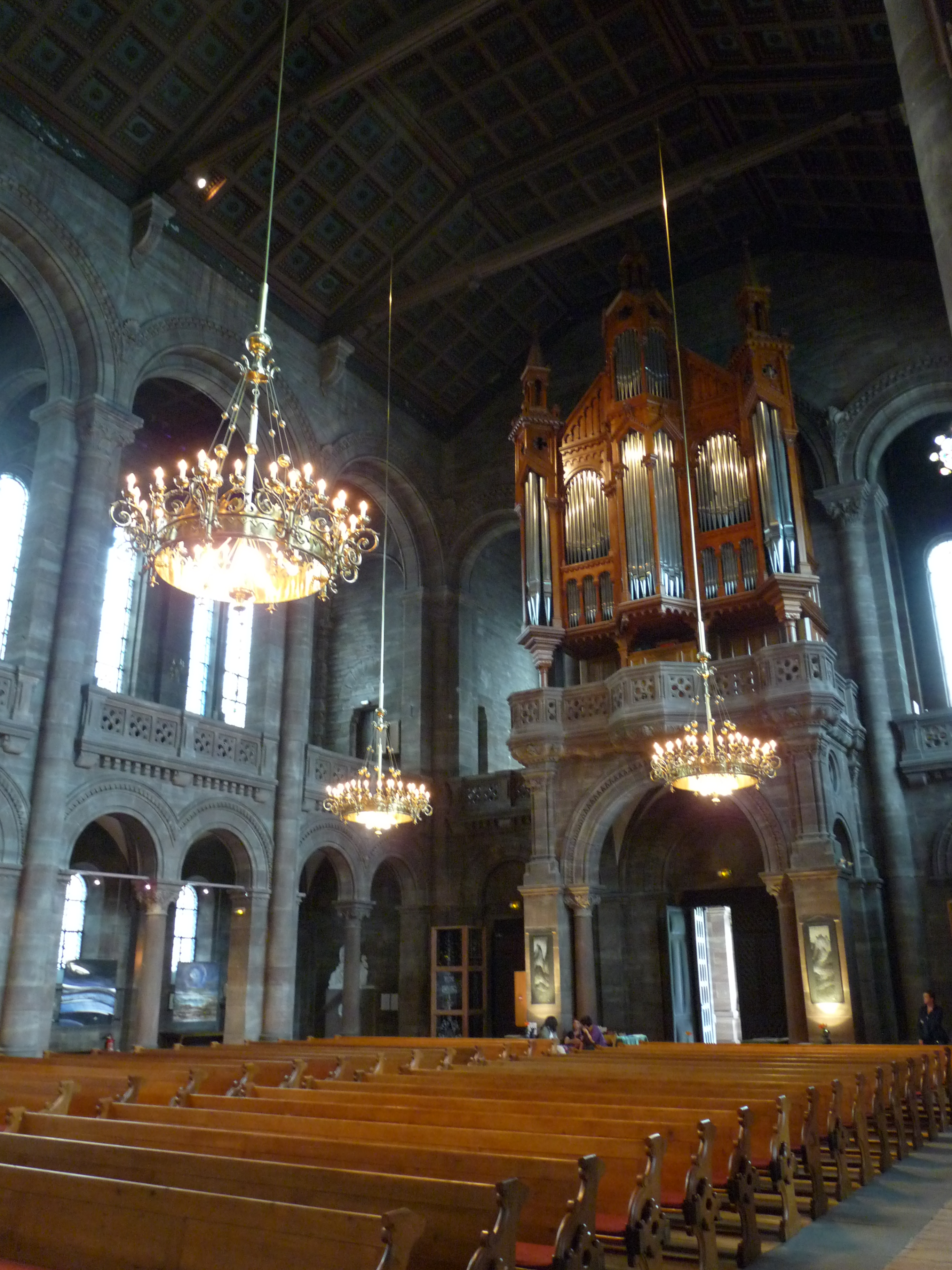 Temple Neuf (Strasbourg)